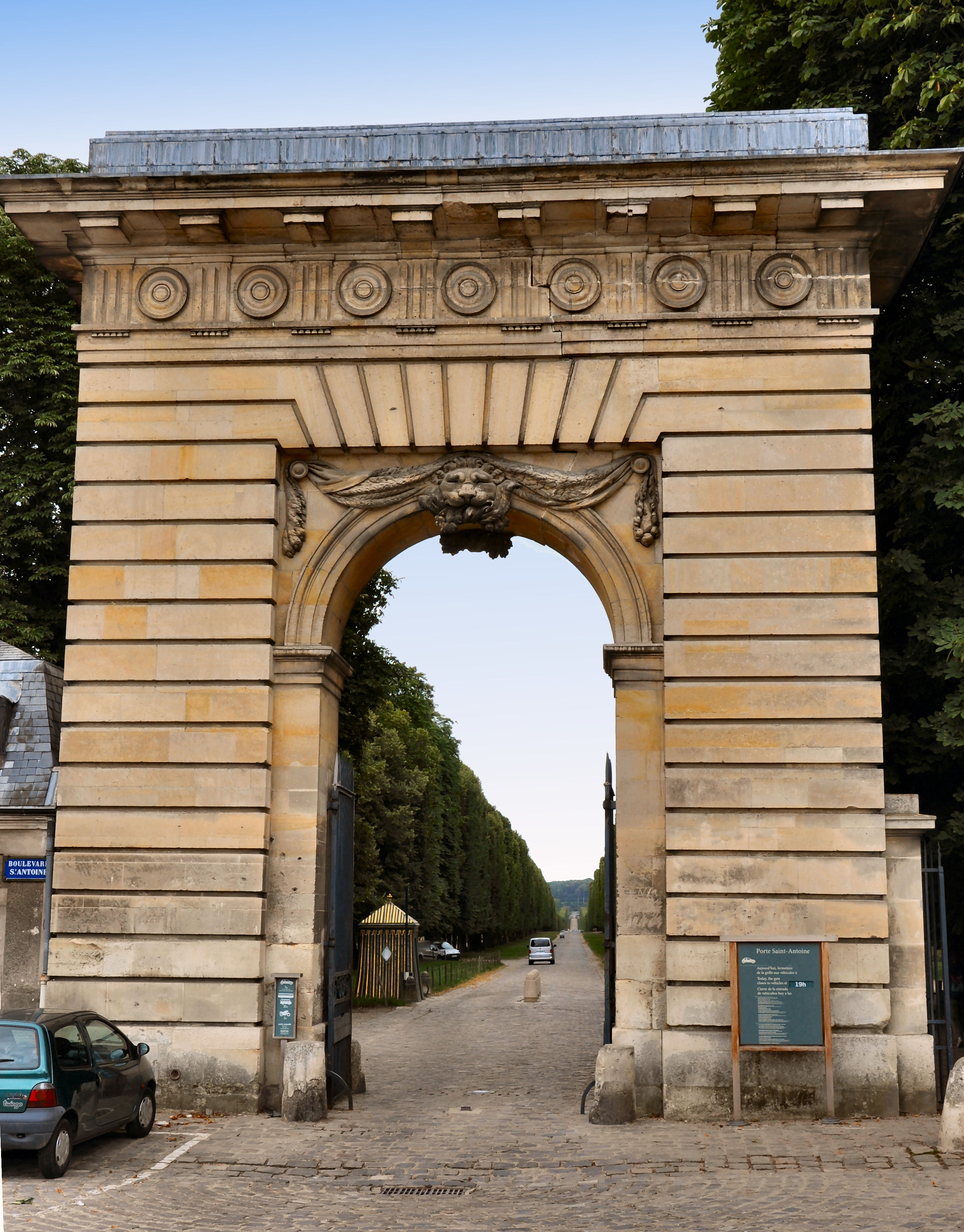 L'arc de triomphe de la porte Saint-Antoine, à l'entrée du domaine de Trianon - Façade nord, côté boulevard Saint-Antoine. On voit l'allée Saint-Antoine par l'ouverture de la porte